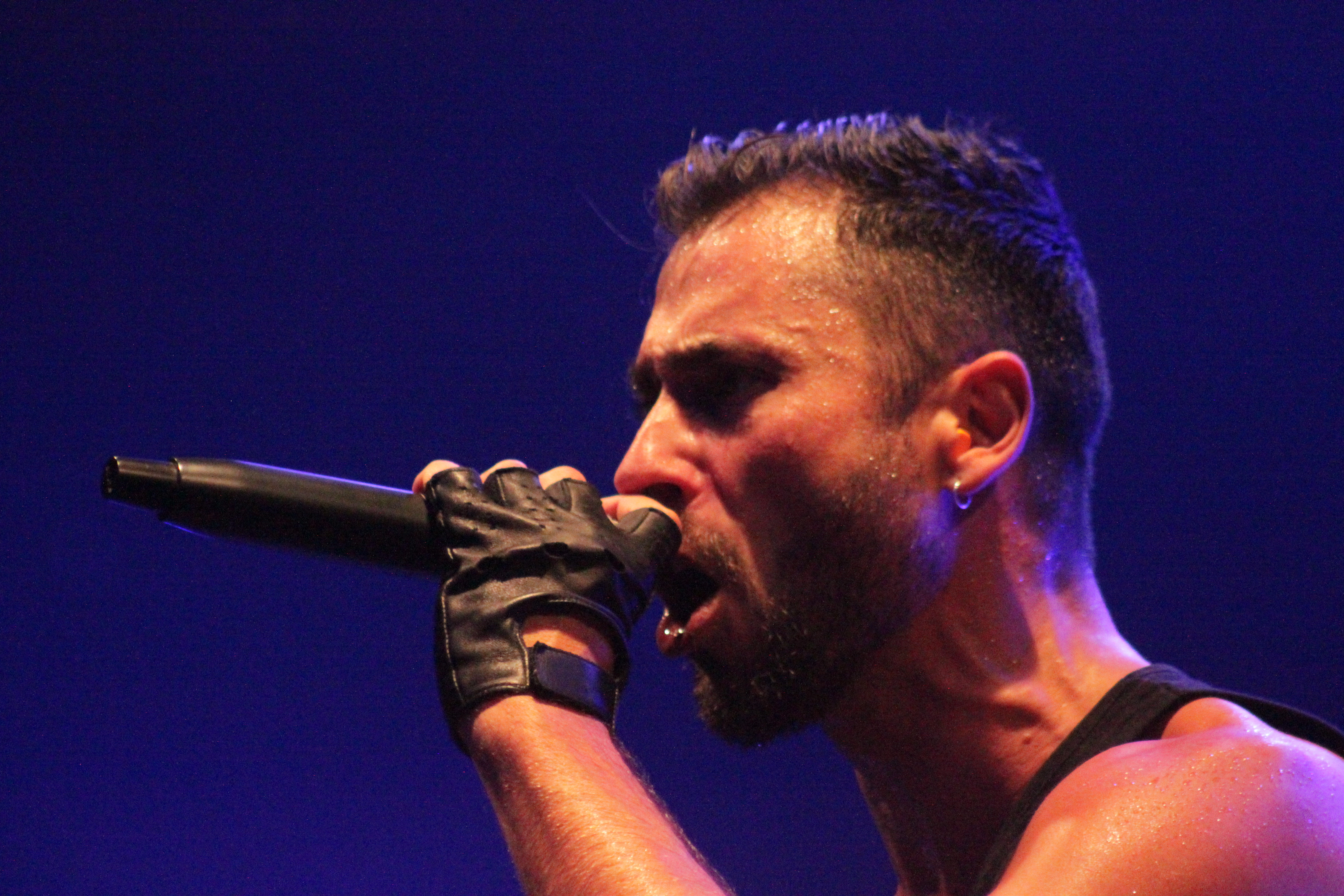 Ricardo, Absurdity au Muscadeath XV, Fr-44-Vallet.